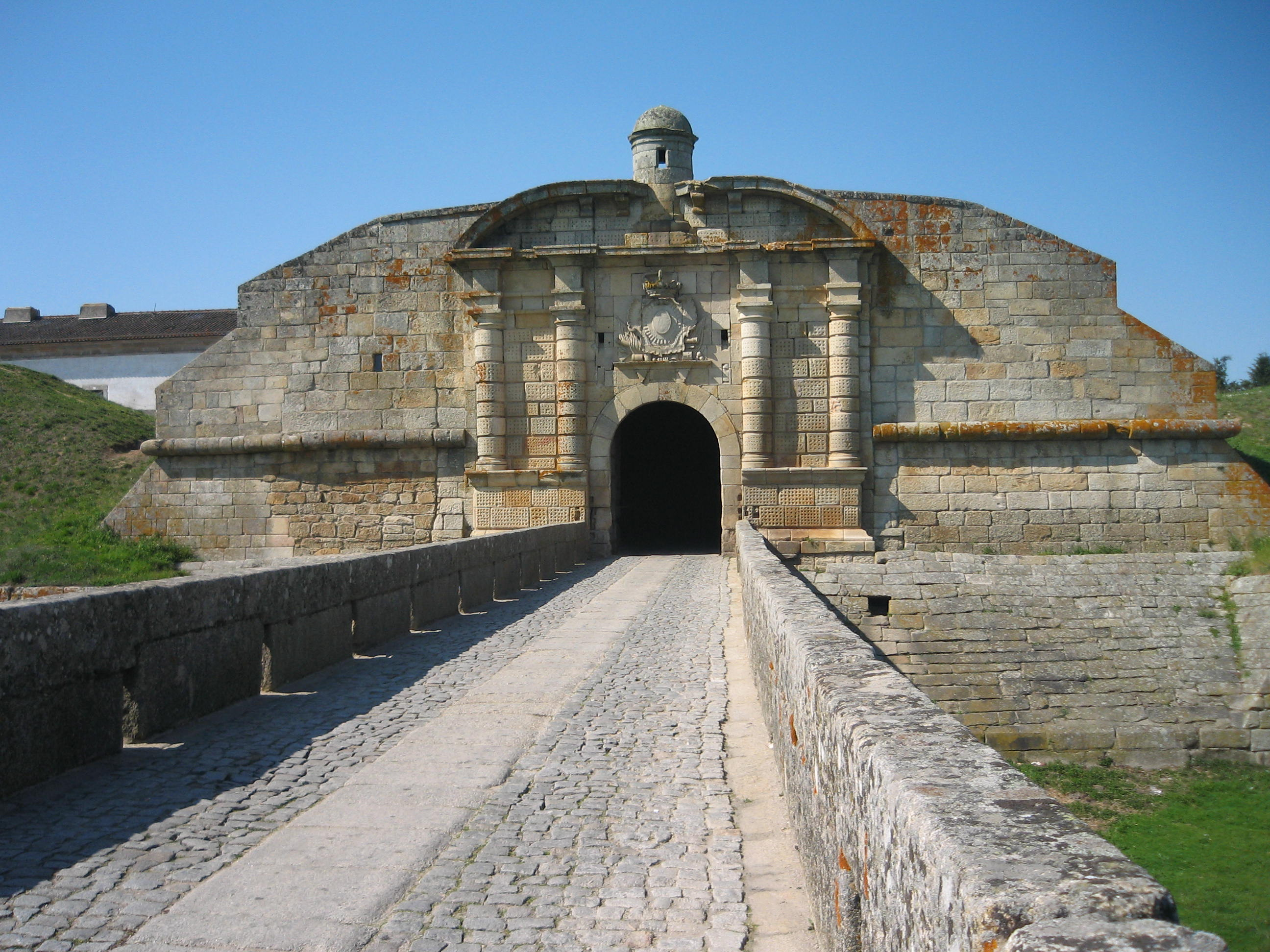 Porta de acesso a Praça, acedida por pontes de alvernaria.Distrito da Guarda. This file was uploaded for Wiki Loves Monuments in Portugal with the unique identifier 70693.